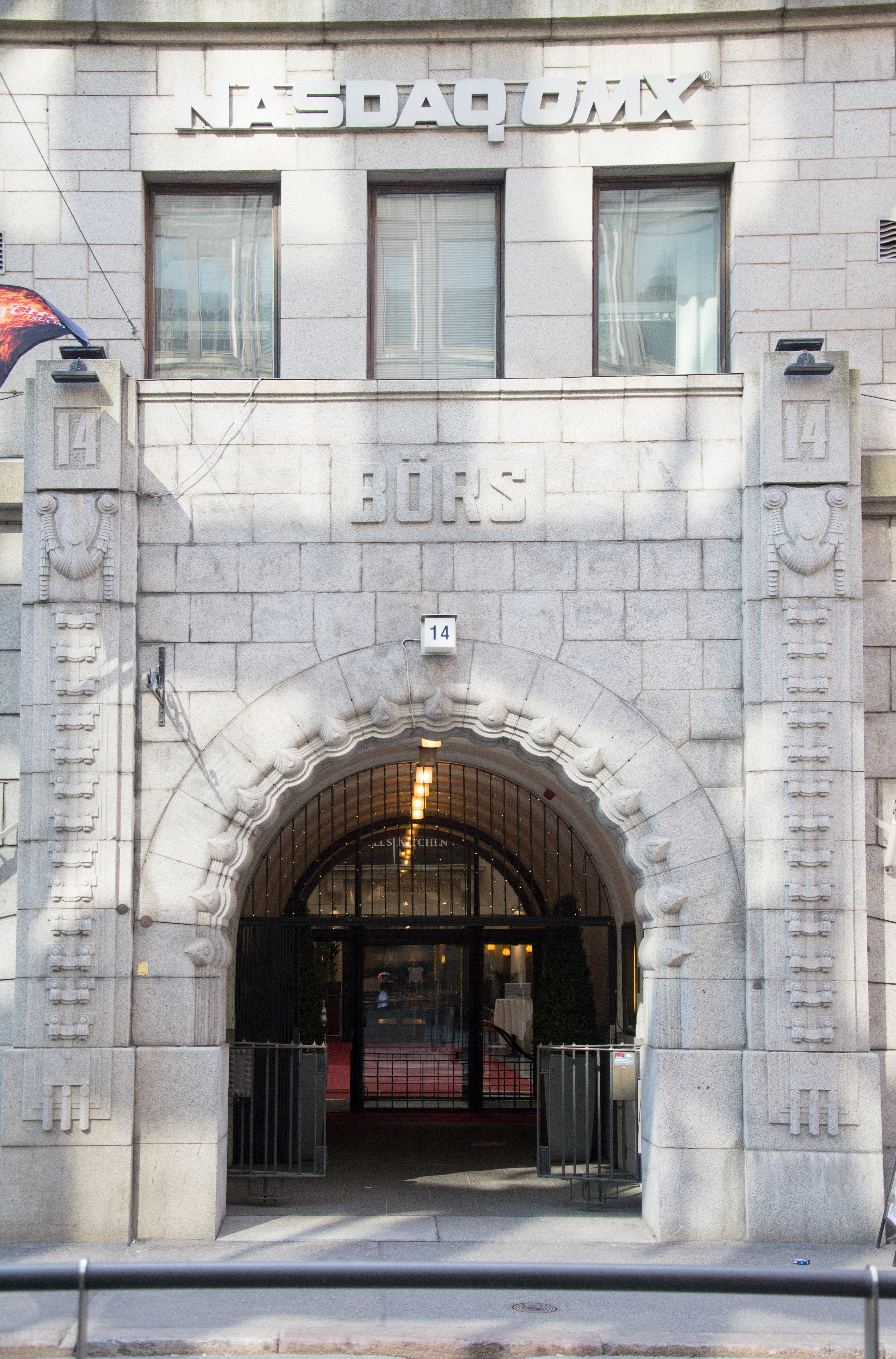 Helsingin pörssin sisäänkäynti